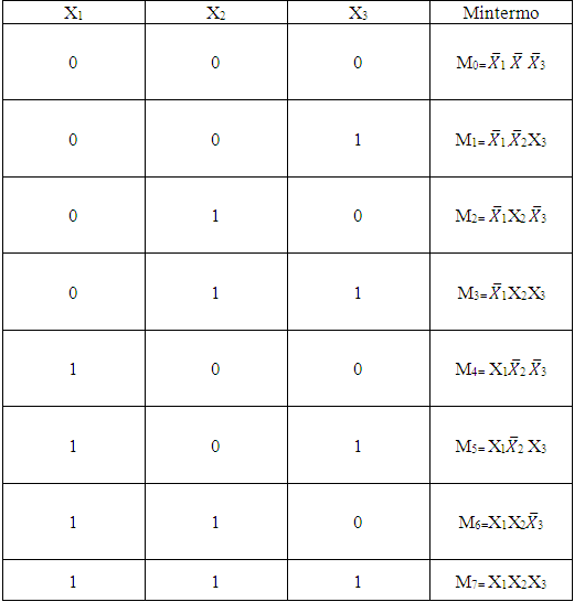 Tabela verdade contendo três variáveis para a demonstração da função Mintermo.